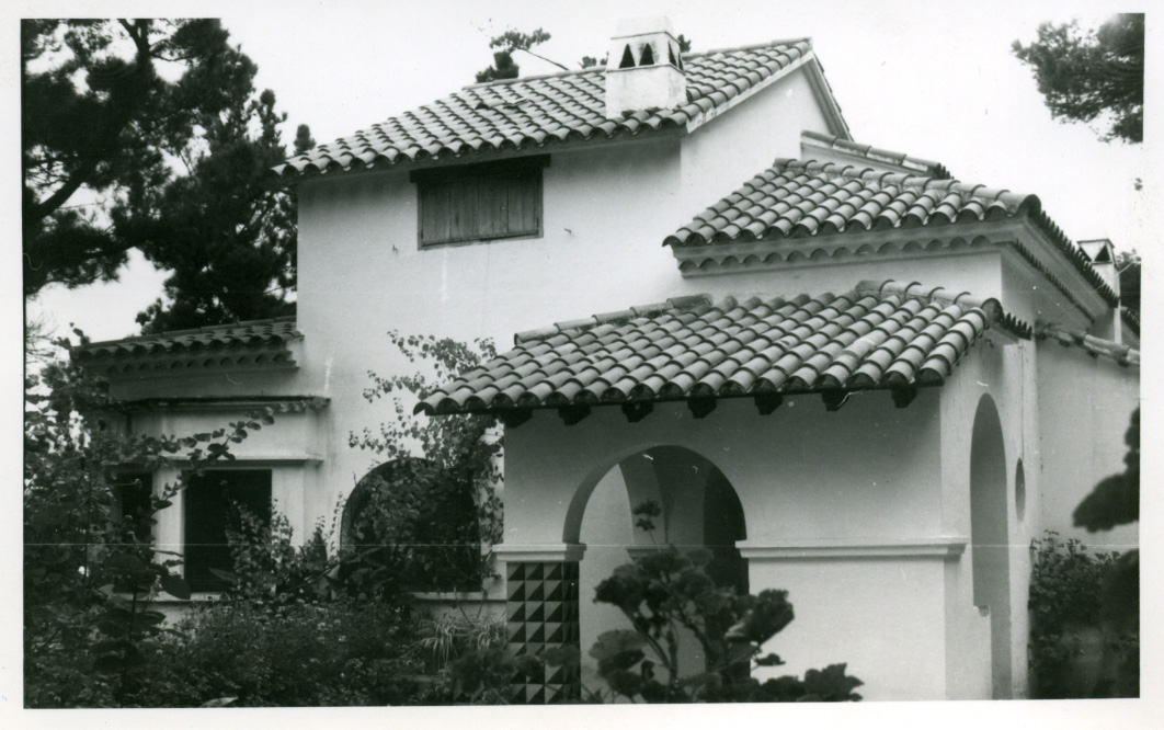 Casa Armengol a Lloret de Mar.